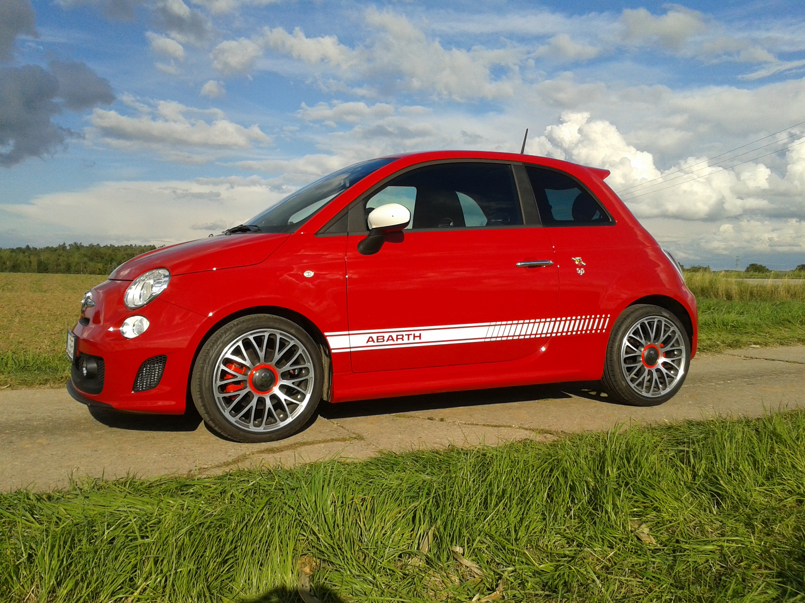 Serie 3